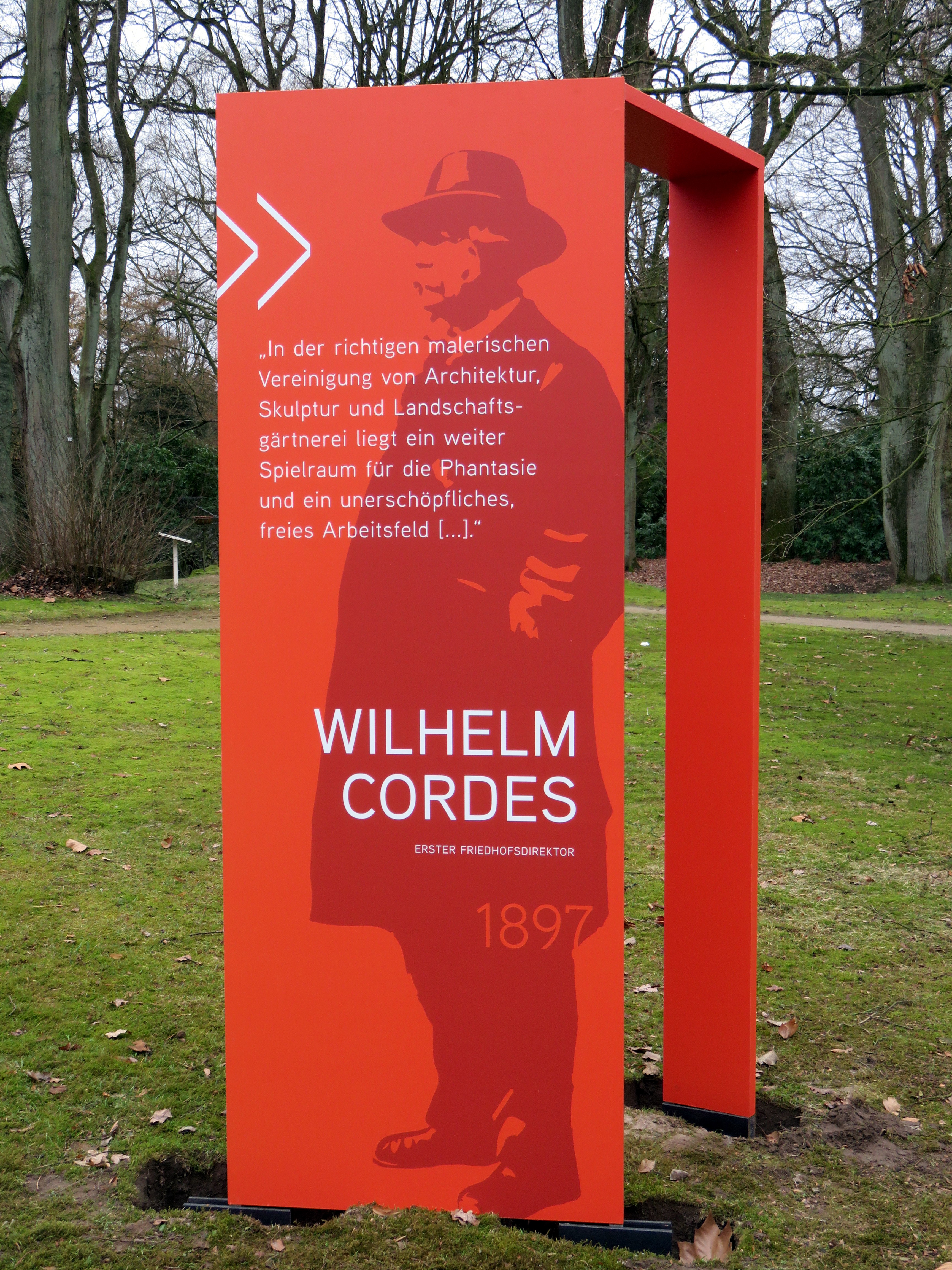 Informationstafeln über die Wiederhertellung des Gartendenkmals Südteich auf dem Friedhof Ohlsdorf, Teil des Zukunftprojektes Ohlsdorf 2050.